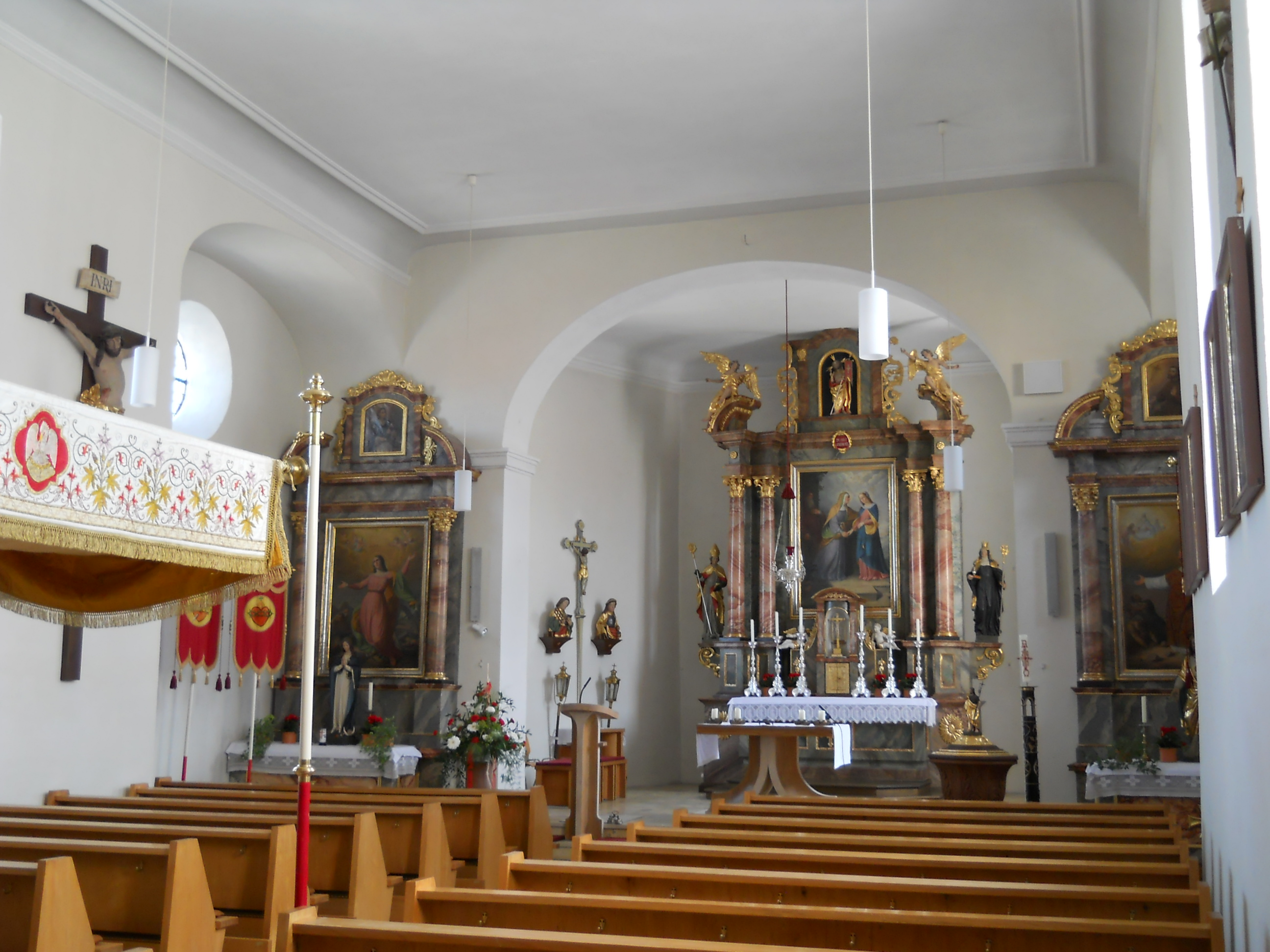 Rauenzell, Ortsteil von Herrieden im Landkreis Ansbach (Bayern), Kath. Pfarrkirche Mariä Heimsuchung, Blick nach Westen